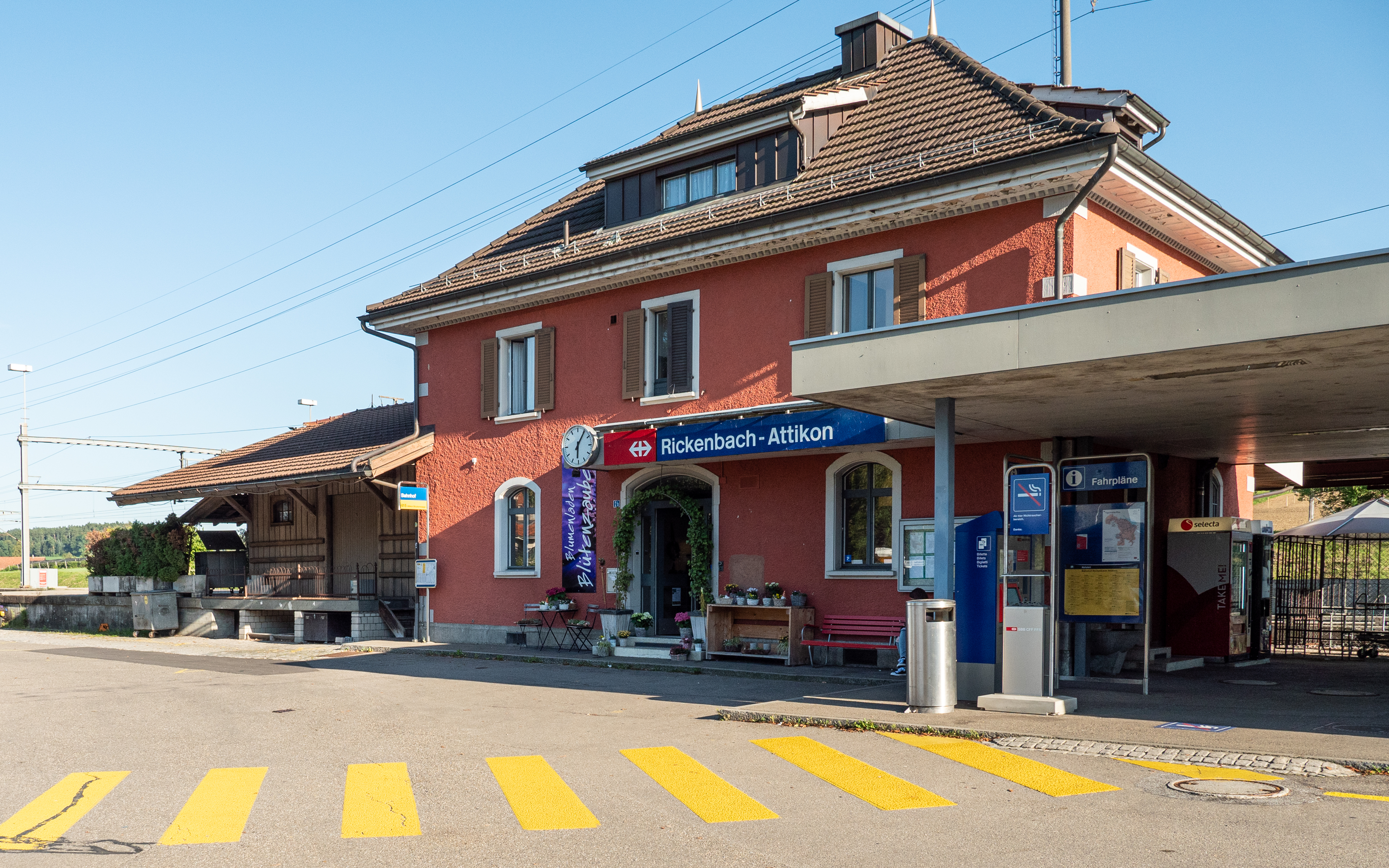 Bahnhof Rickenbach-Attikon an der Bahnstrecke Winterthur - Romanshorn